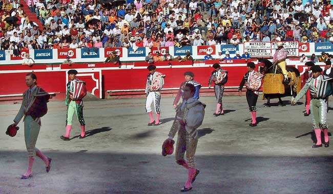 Toreros realizando el paseillo previo a la corrida en una plaza de Colombia.